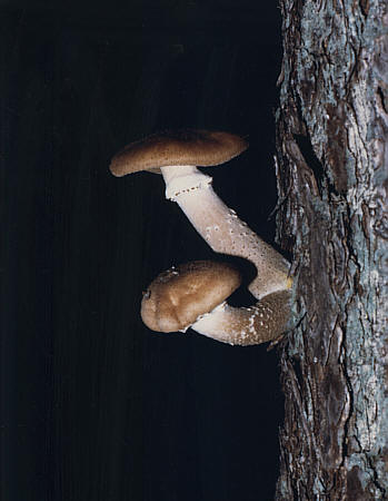 Hallimasch an einem Baumstamm Fotograf: Walter J. Pilsak, Waldsassen Copyright Status: GNU Freie Dokumentationslizenz